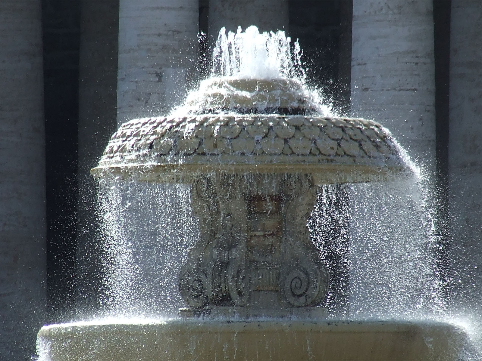 Piazza San Pietro, Roma, Vaticano, Fontana lato nord